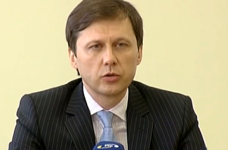 Шевченко Ігор Анатолійович — український правник і політик. Міністр екології та природних ресурсів України.